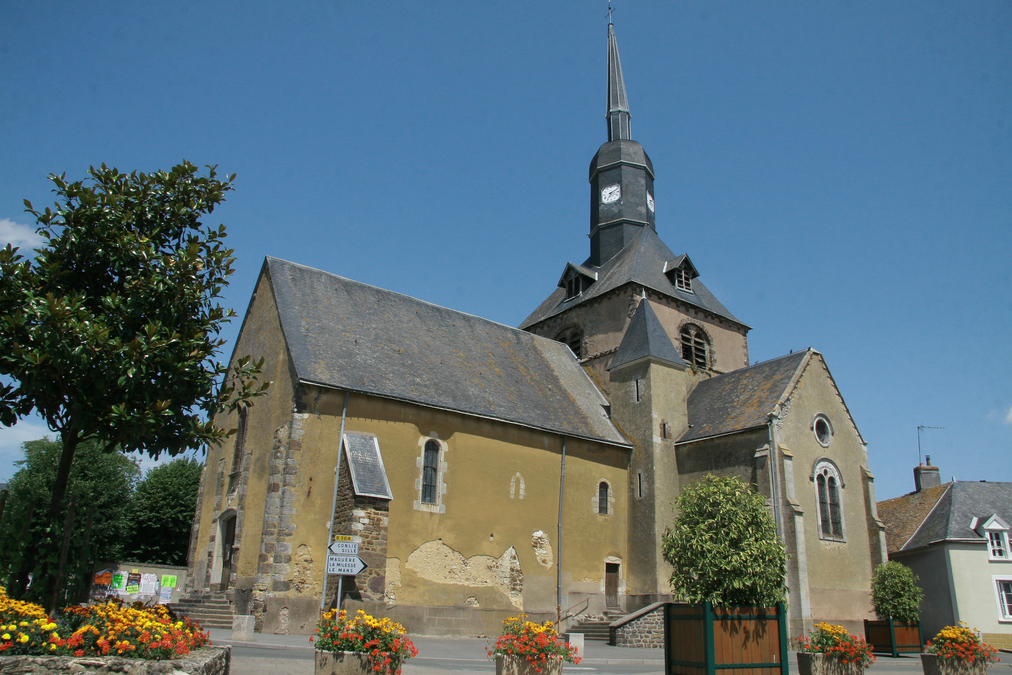 Église Saint-Front de Domfront-en-Champagne, Sarthe, Pays de la Loire, France